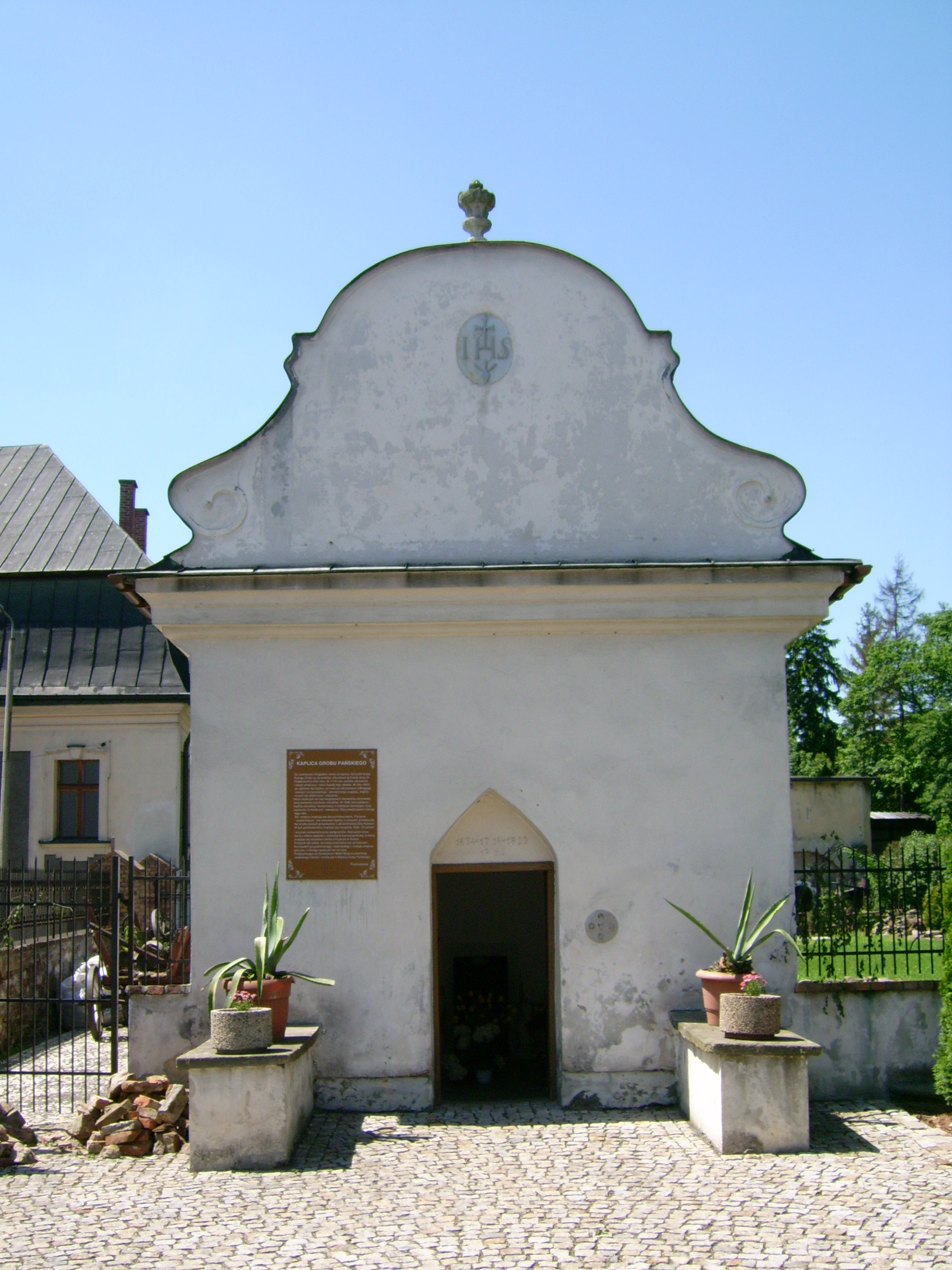 Głogówek - kaplica "Boży Grób". 08.1966.